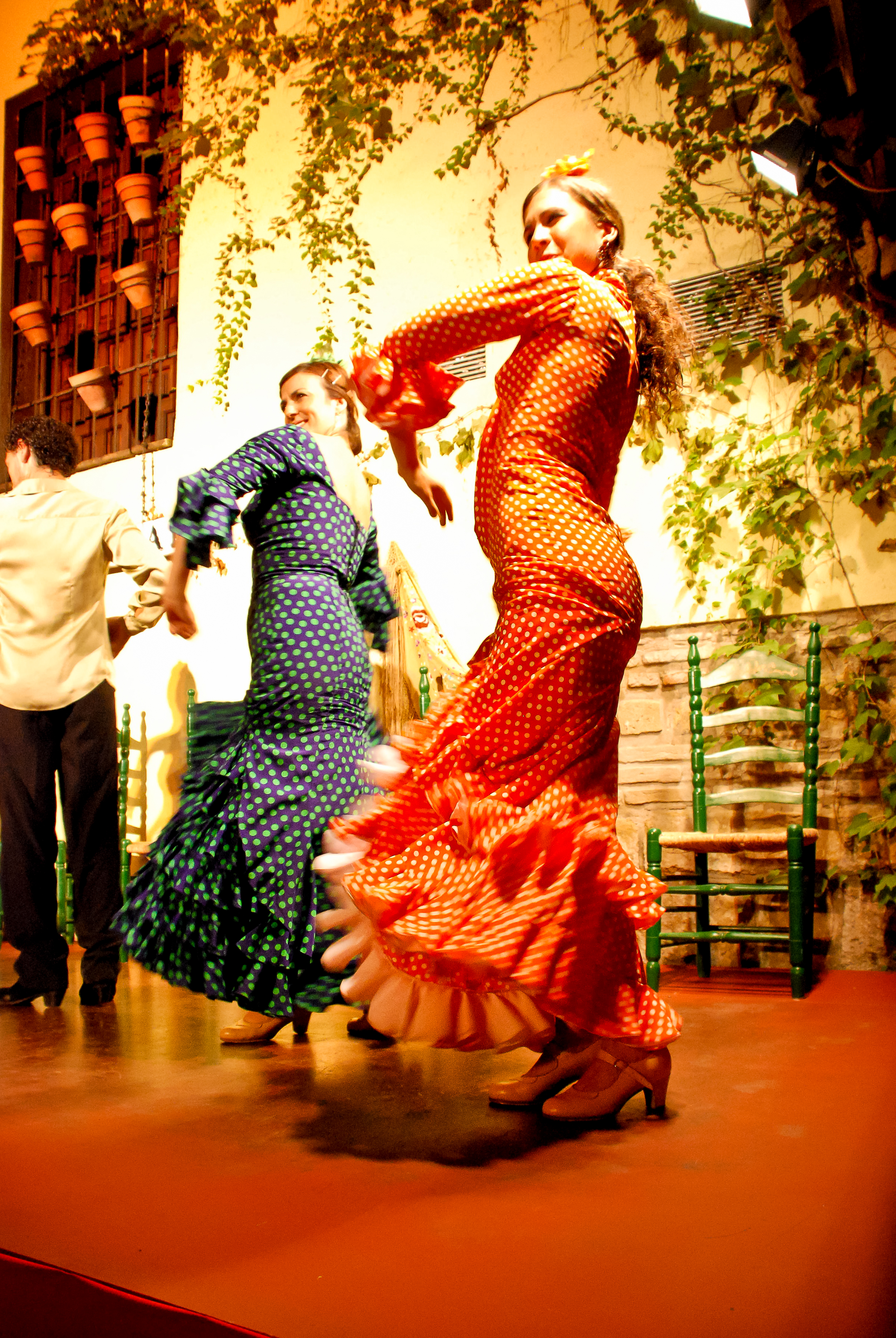 Flamenco en Córdoba (España).